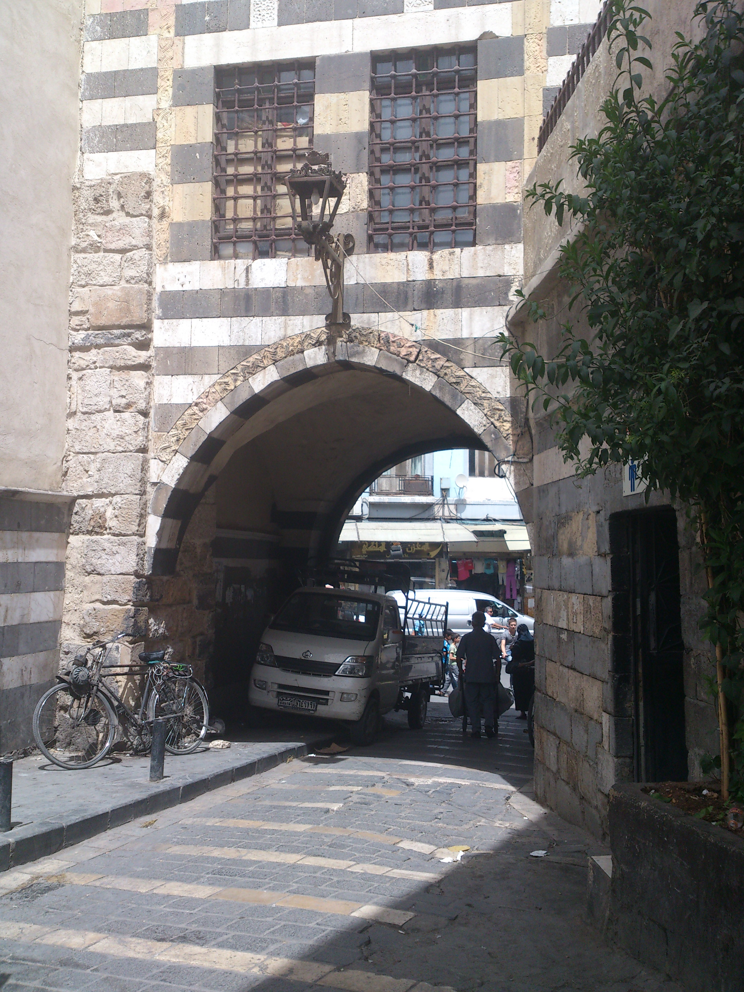 أحدى بوابات حي القنوات